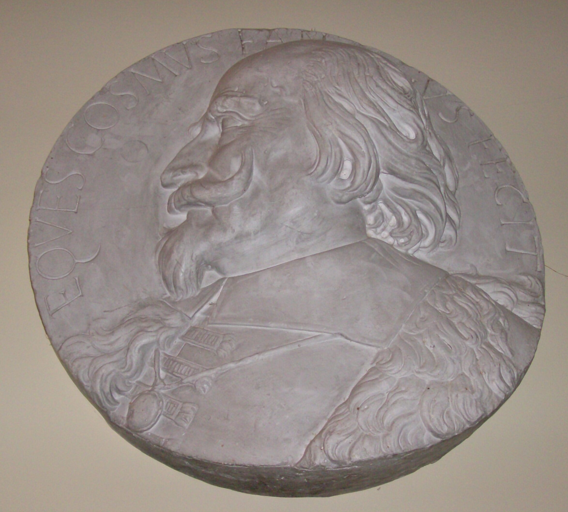 Autoritatto di Cosimo Fanzago, riproduzione proveniente dall'abitazione del nobile cavaliere Aliprando Fanzago degli Aliprandi (Padova 8 aprile 1920 - Bassano del Grappa 12 agosto 2007) collezione privata